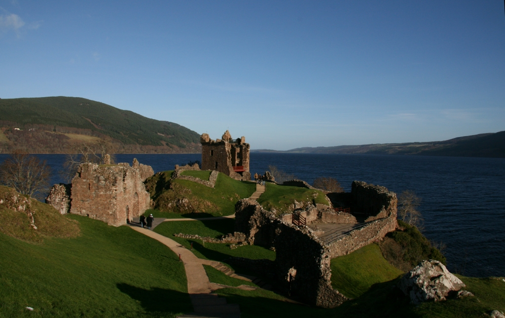 Urquhart Castle